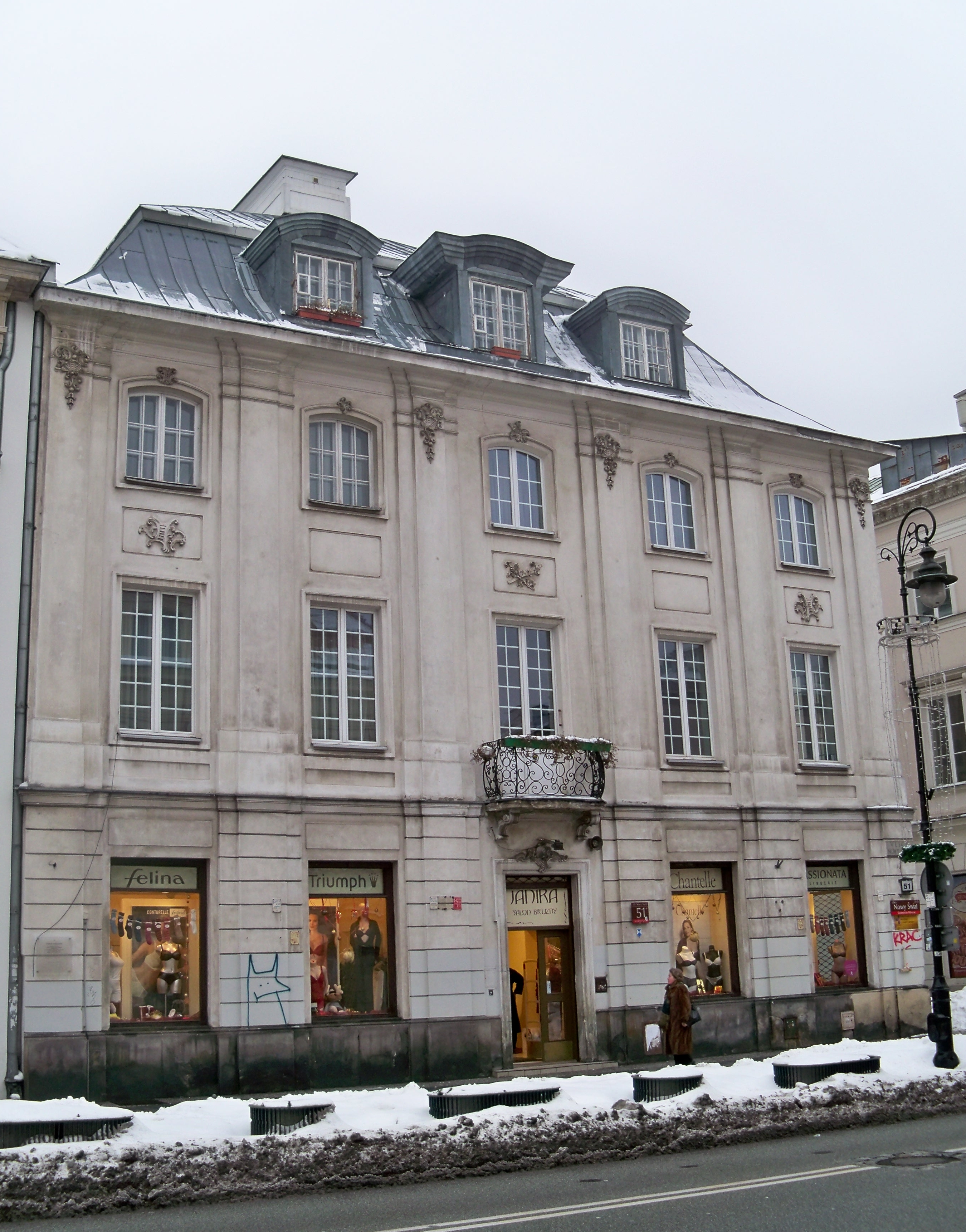 Pałacyk Sanguszków w Warszawie. Nowy Świat 51.